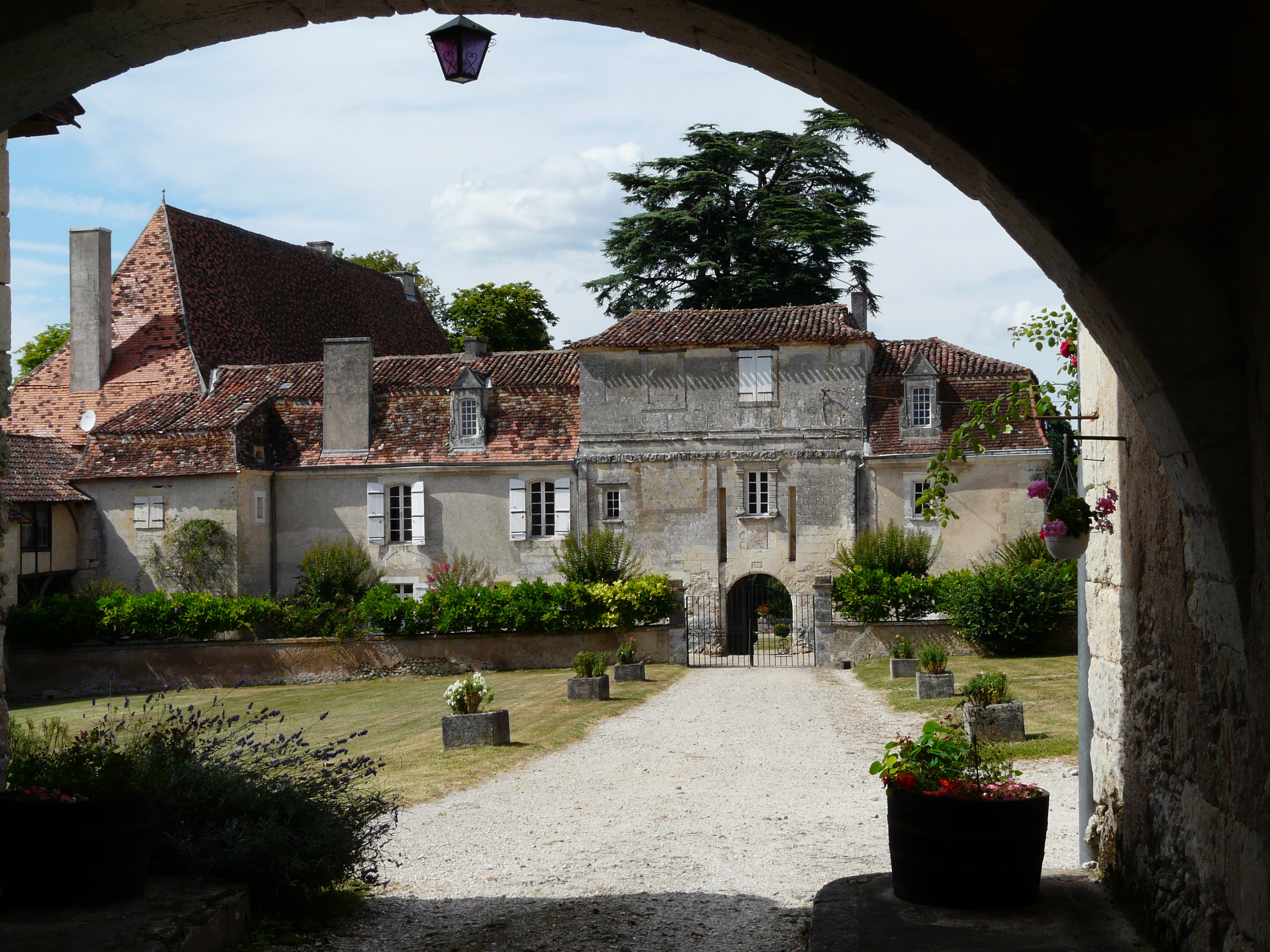 Le château de Segonzac (Dordogne), à 1 km du bourg Object location45° 12′ 16″ N, 0° 26′ 01″ E